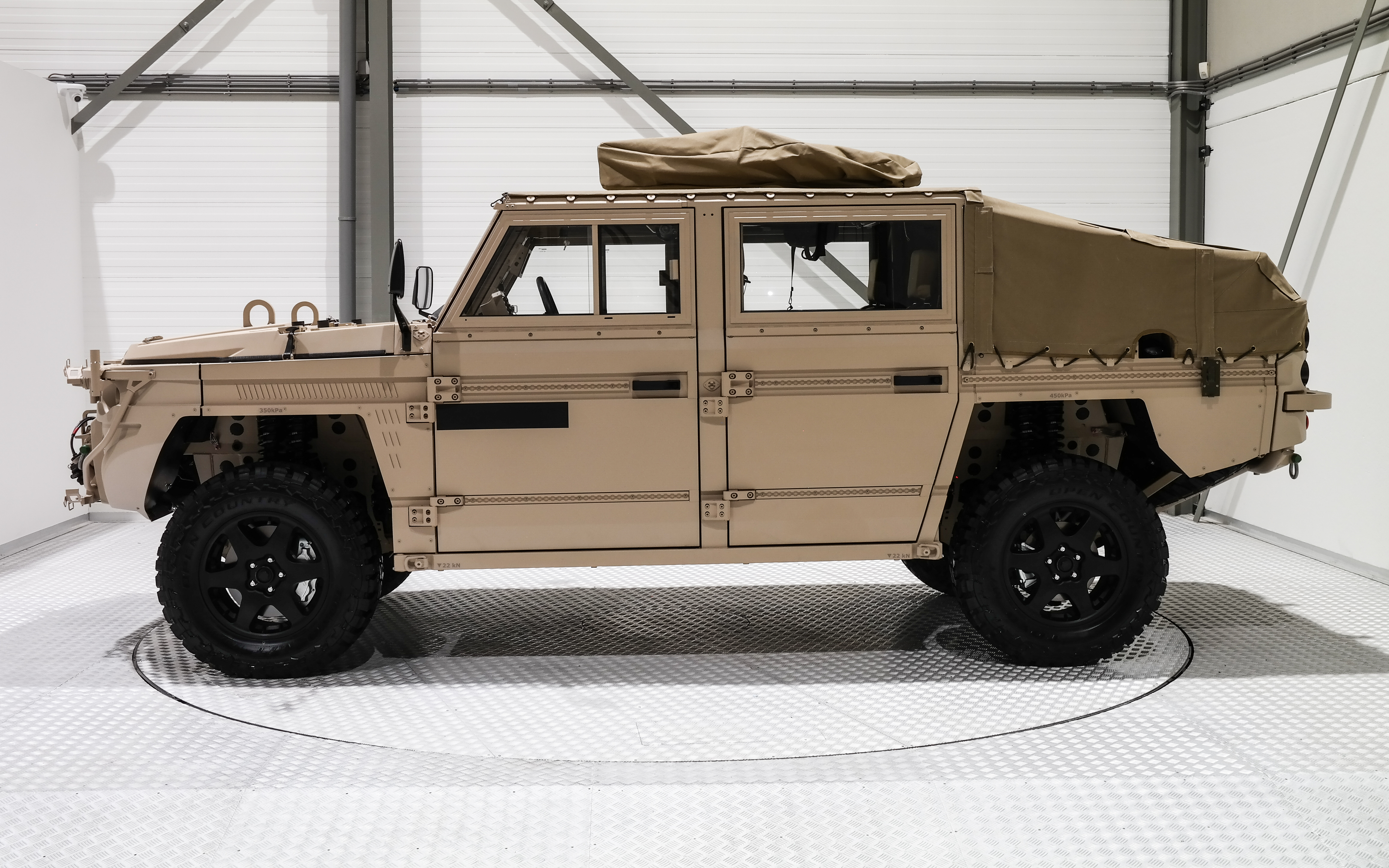 Zijkant VECTOR